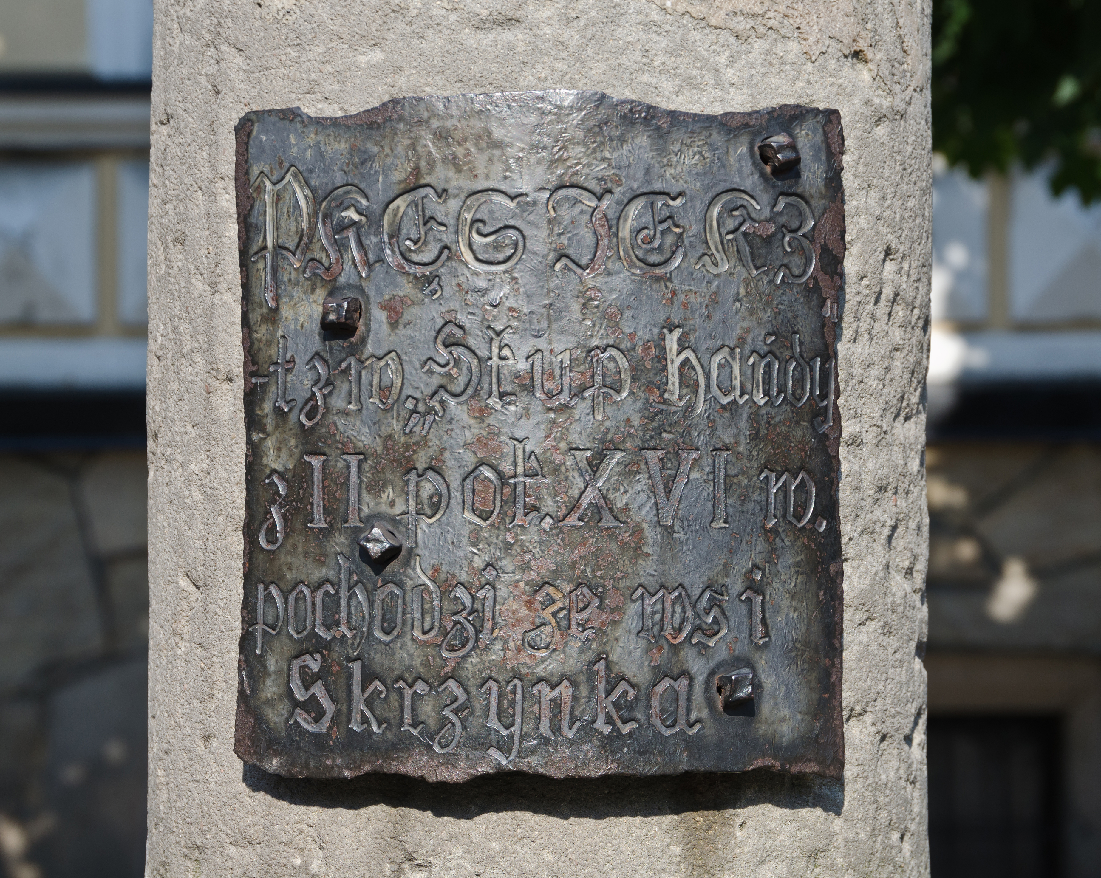 Lądek-Zdrój, historyczny układ urbanistyczny miasta, pręgierz